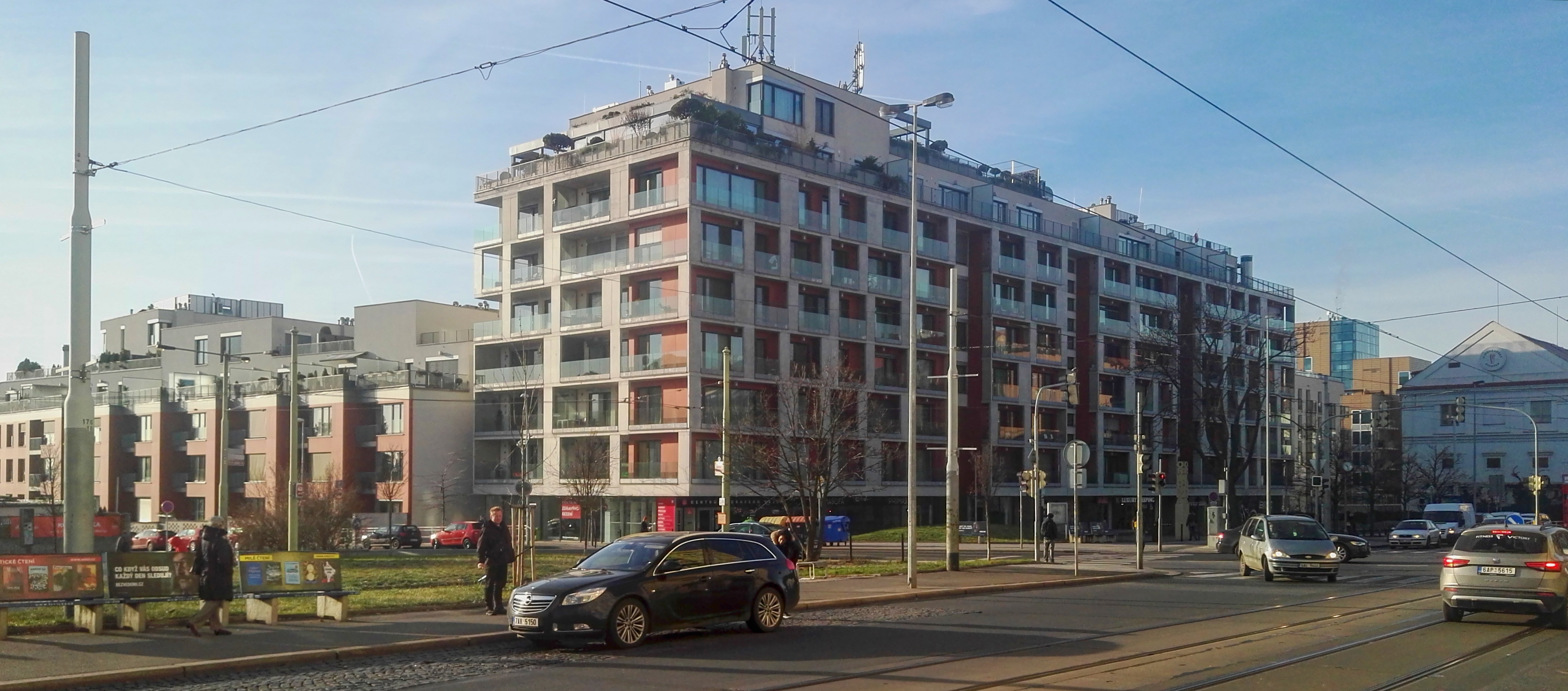 Náměstí U Orionky, pohled od severovýchodu k nové zástavbě